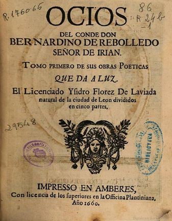 "Ocios" Bernardino de Rebolledo